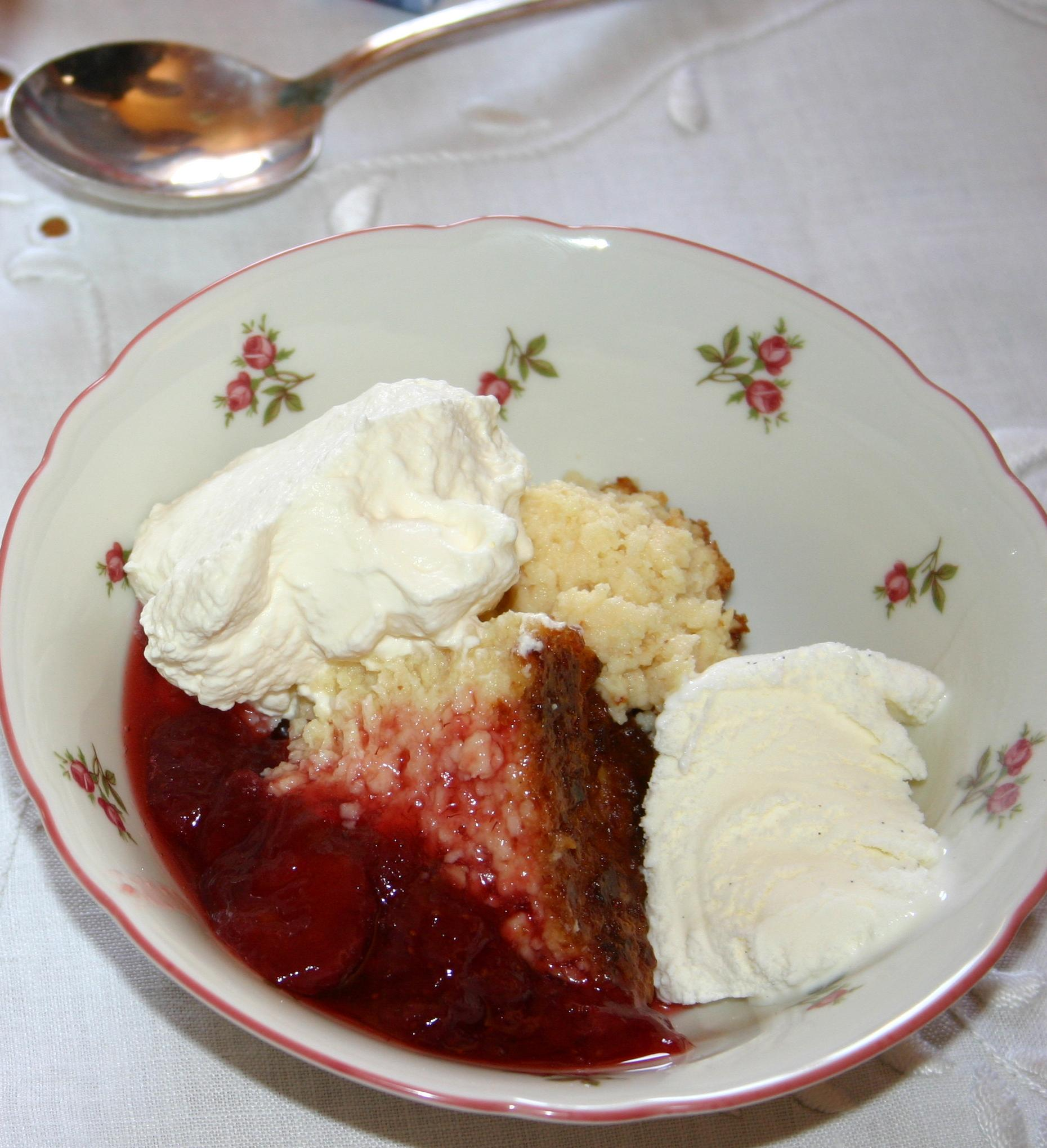 Ostkaka servert med is og jordbærsyltetøy